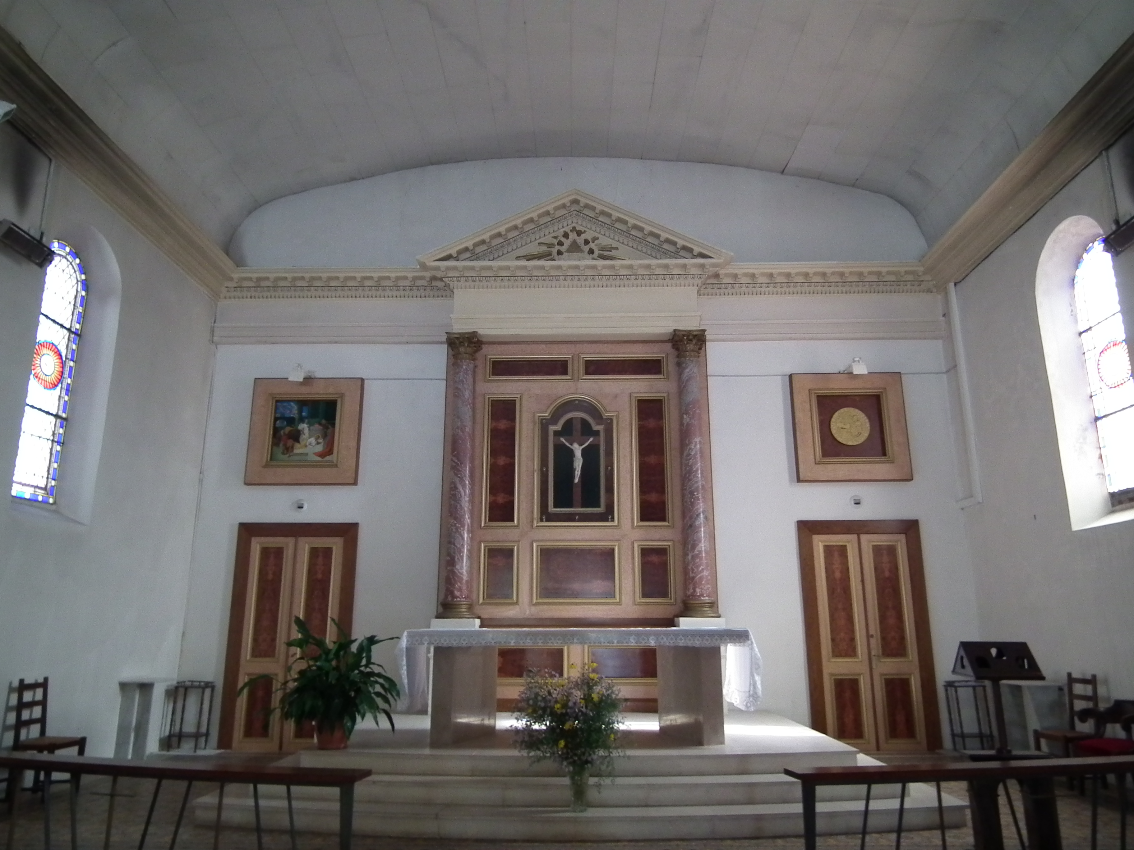 L'intérieur de l'église de Meschers-sur-Gironde